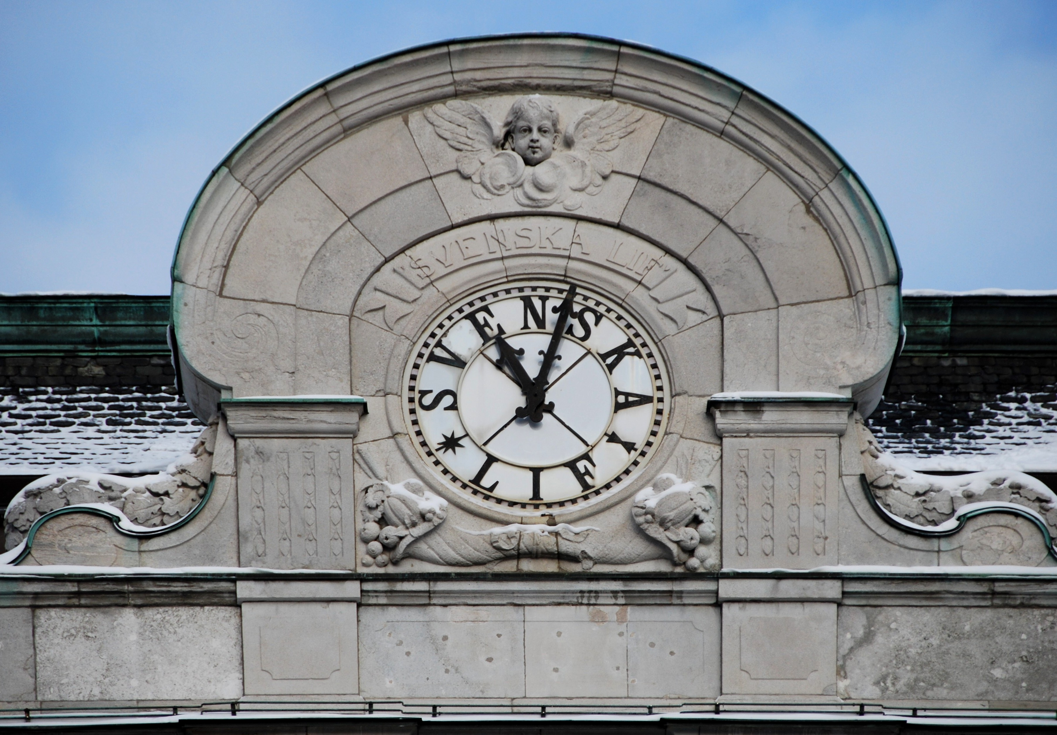 Svenska lif, klocka. Smålandsgatan 16